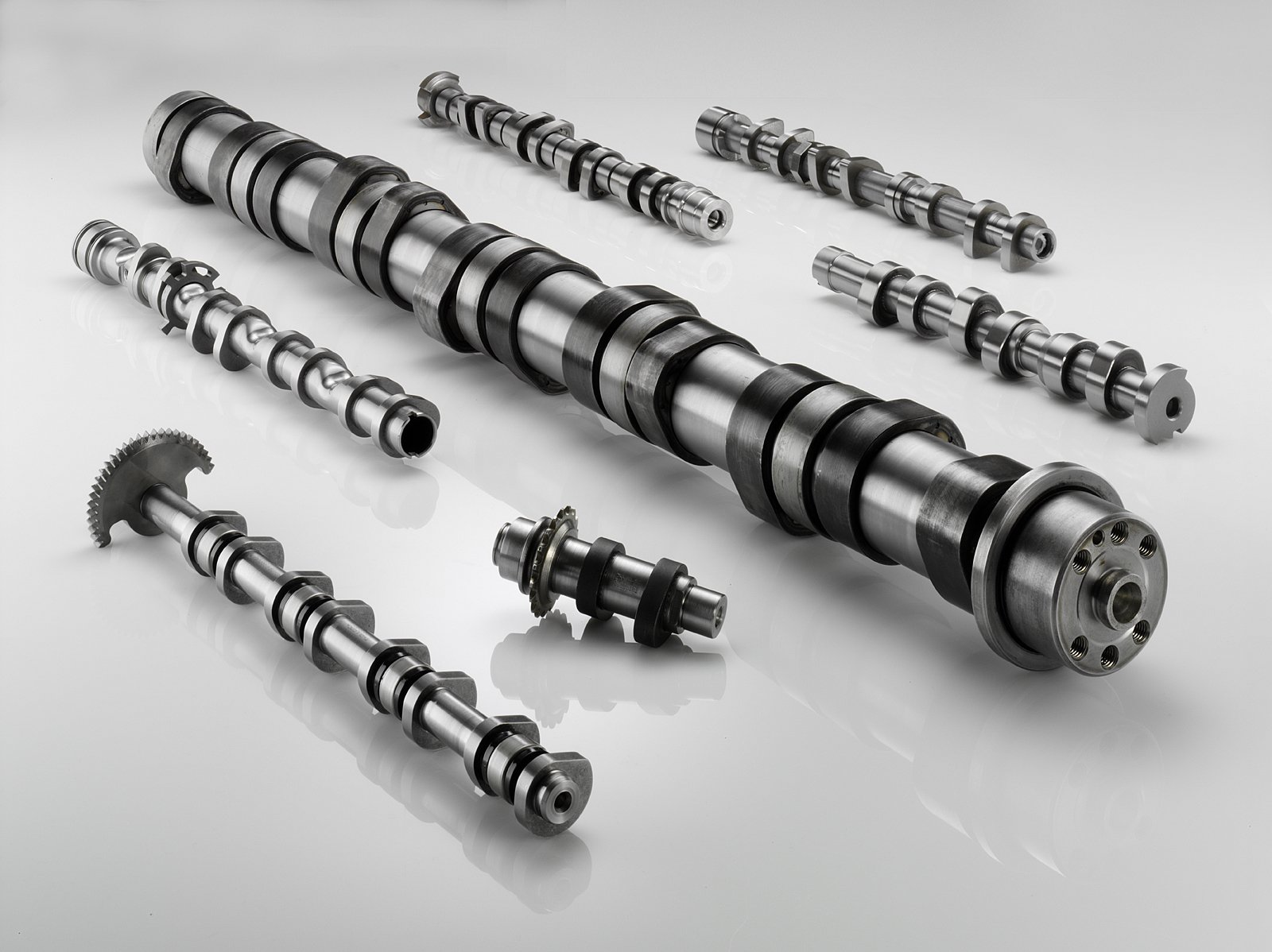 gebaute PKW- und LKW-Nockenwellen für Verbrennungsmotoren von ThyssenKrupp Presta Chemnitz GmbH